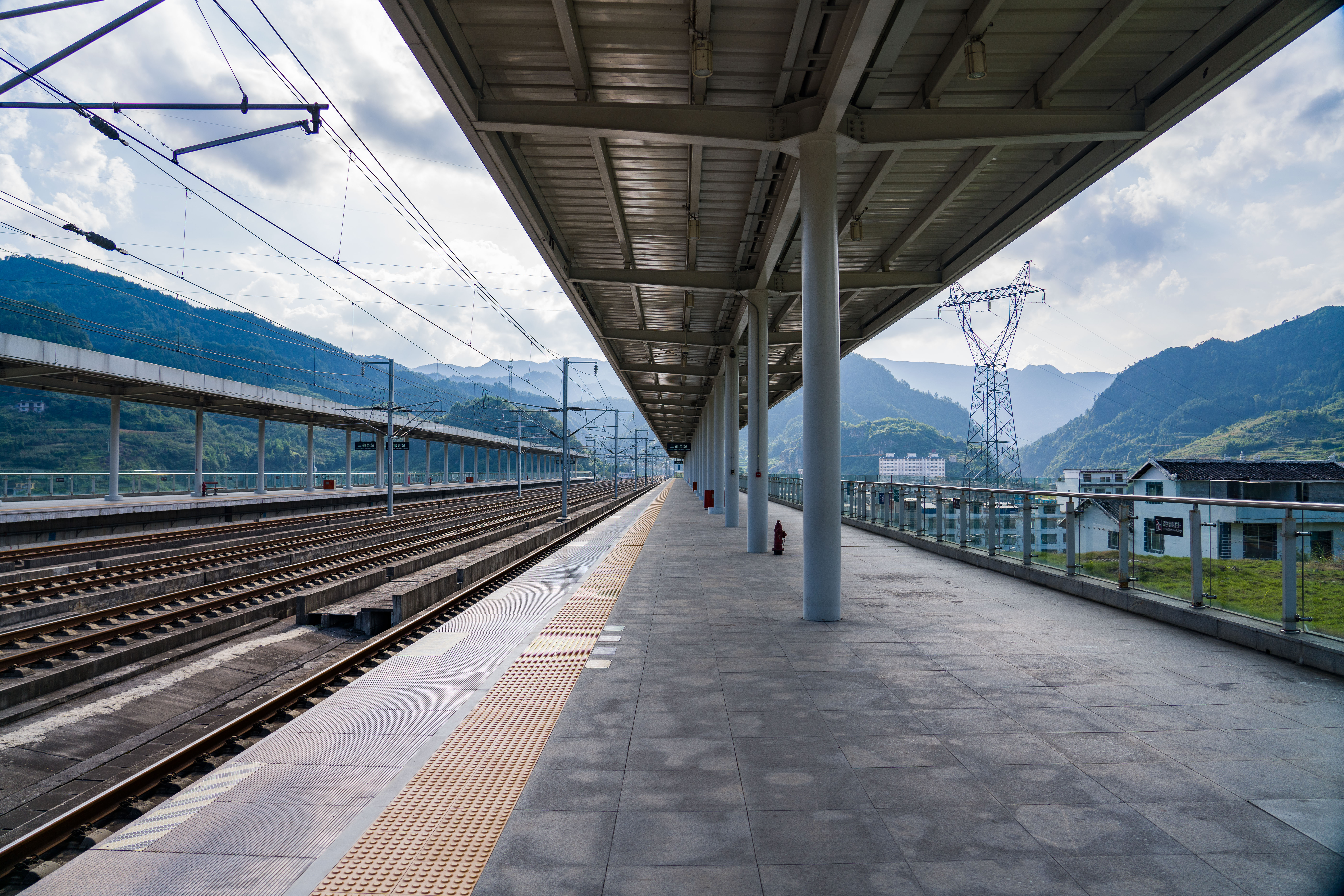 贵广客运专线三都县站站台